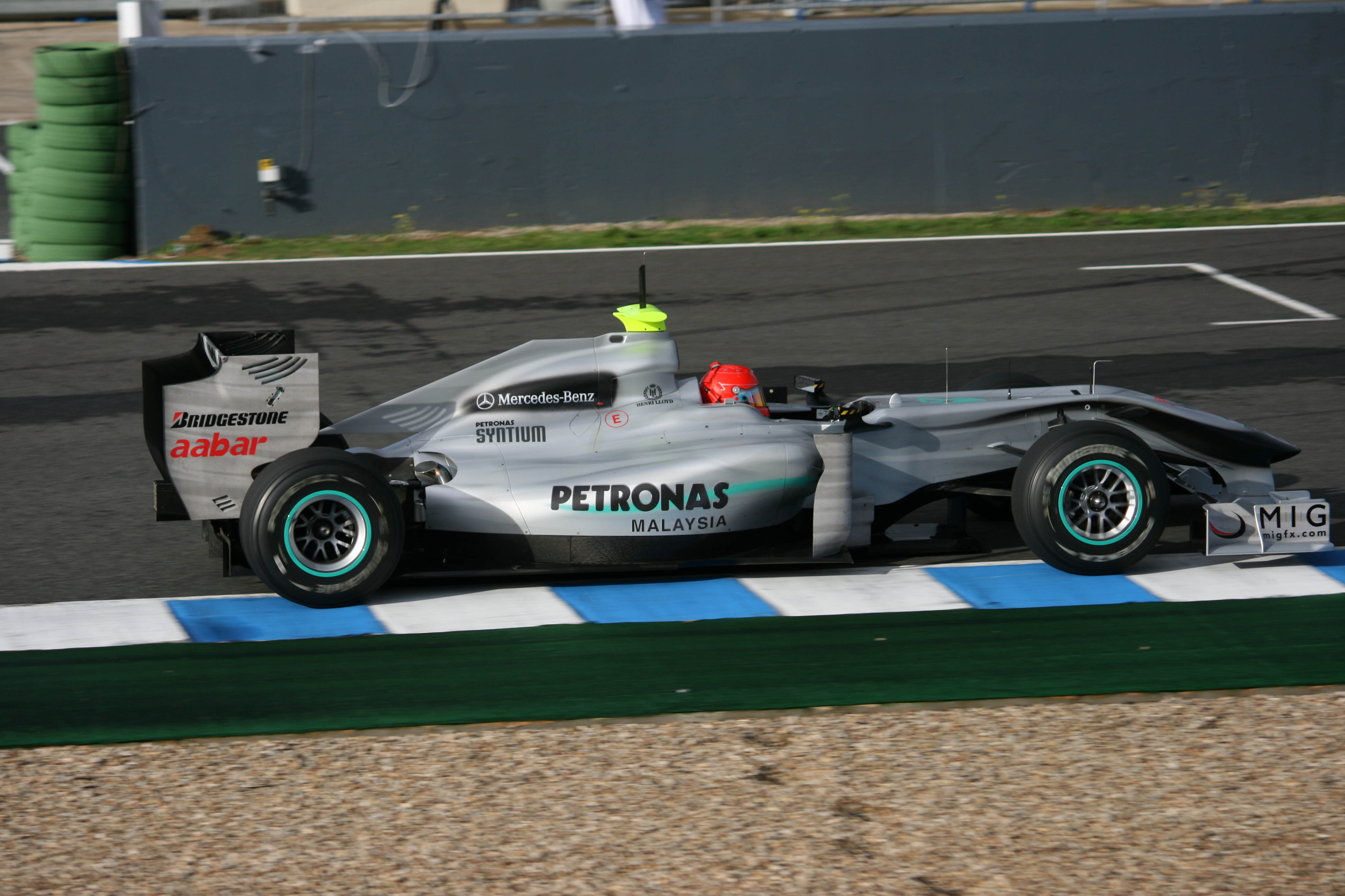 Michael Schumacher testing for Mercedes GP at Jerez, 11/02/2010.